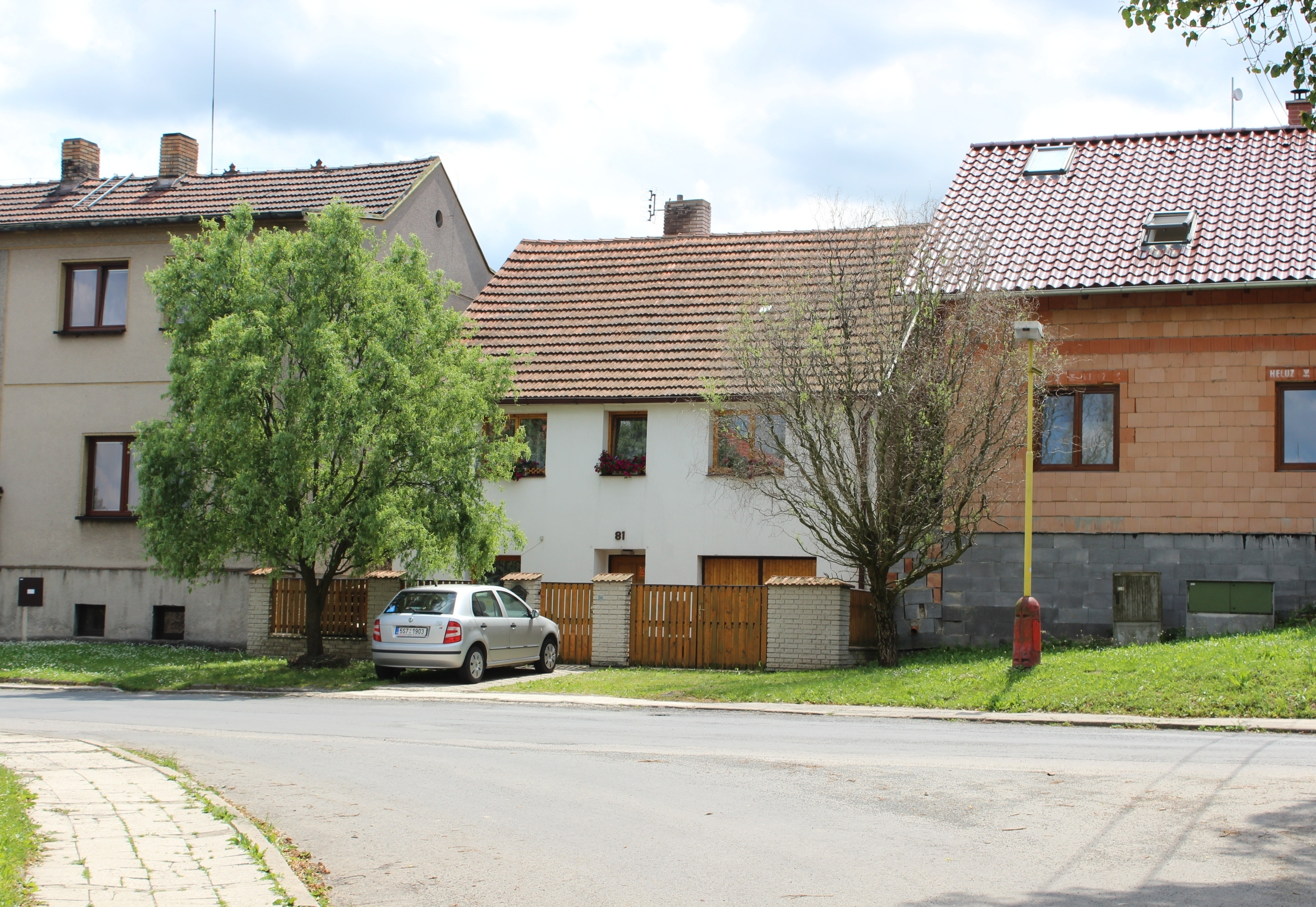 Dům číslo popisné 81 v Bratronicích v kladenském okrese.